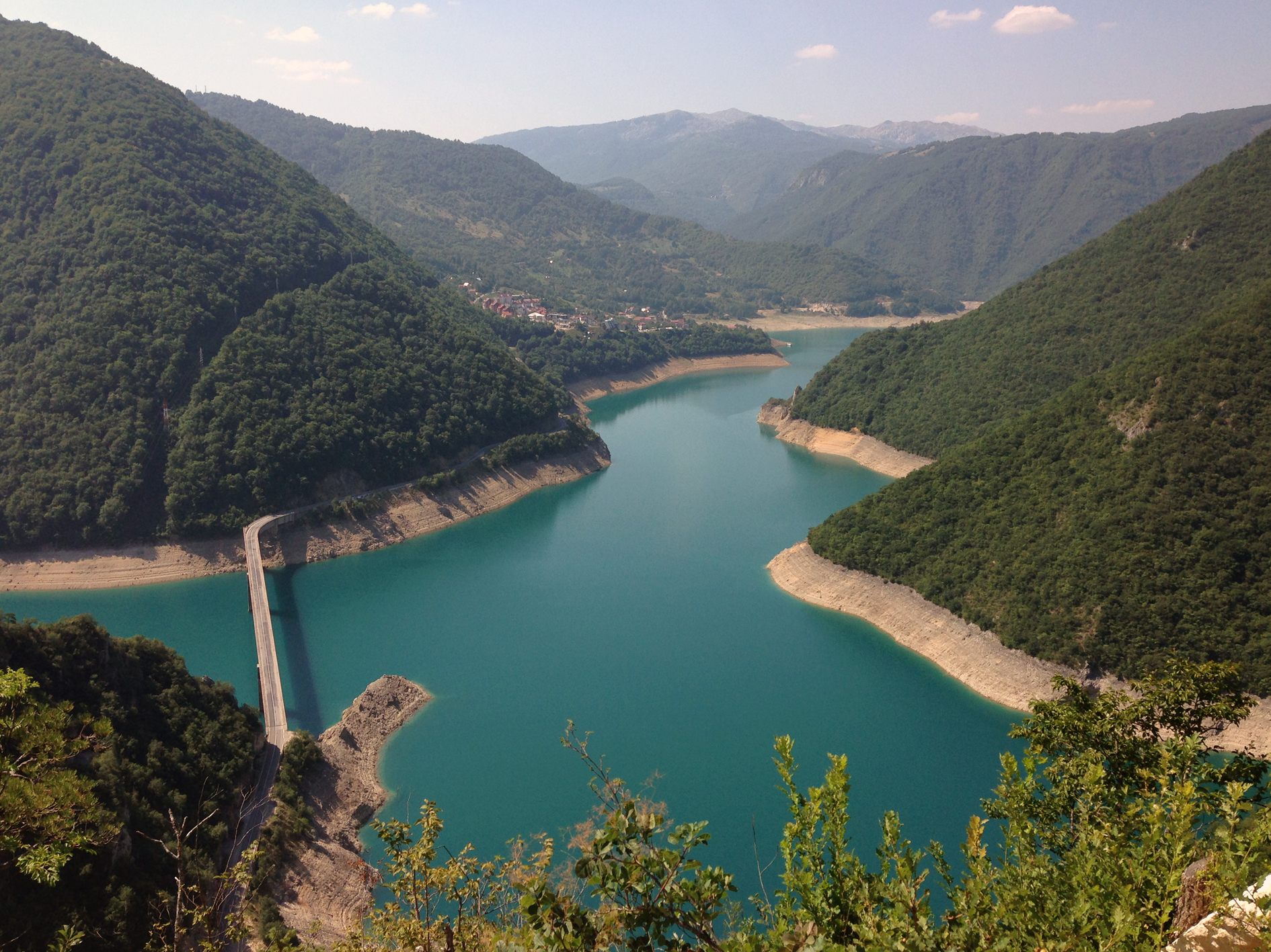 Река Пива